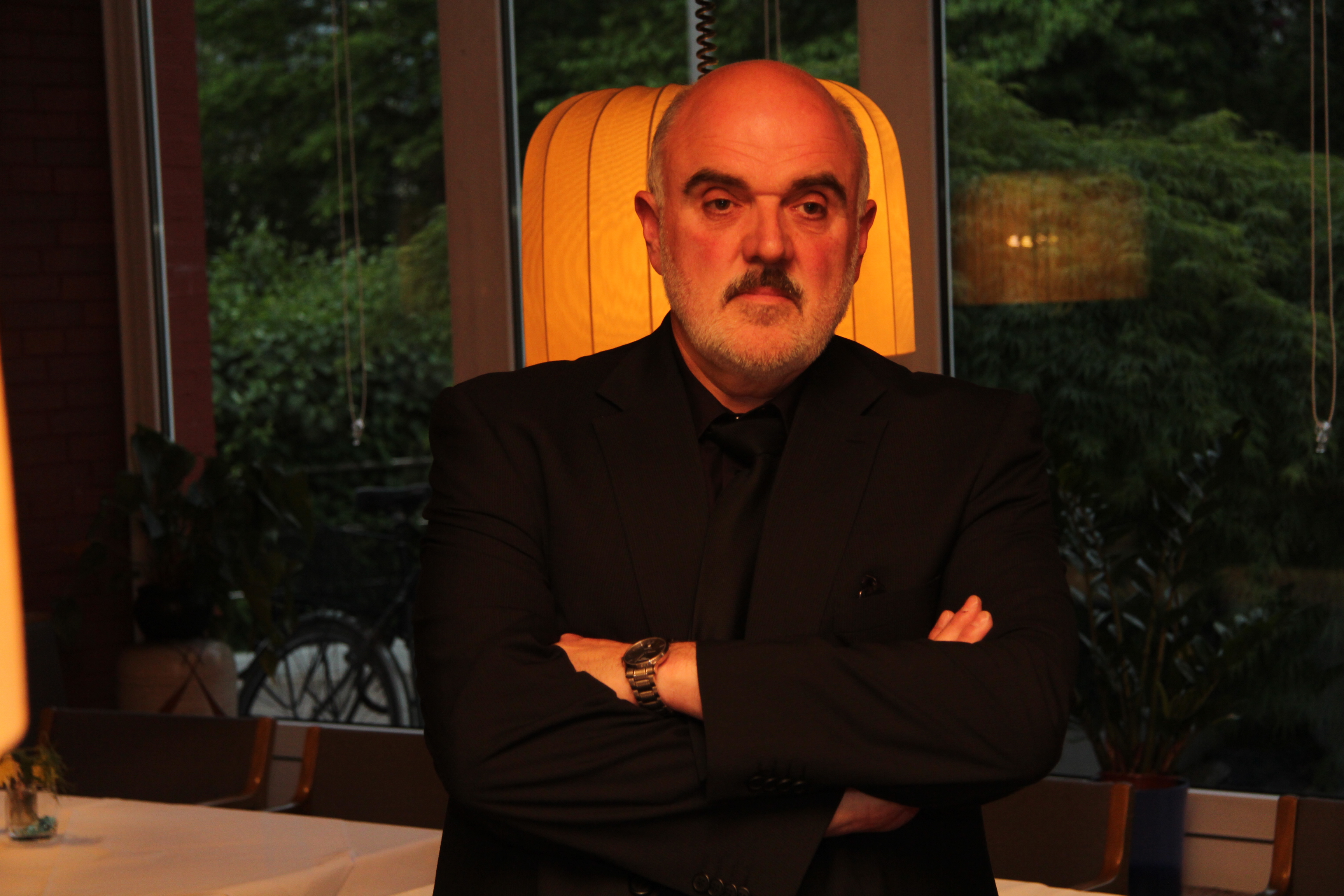 Joachim H. Peters, 2015